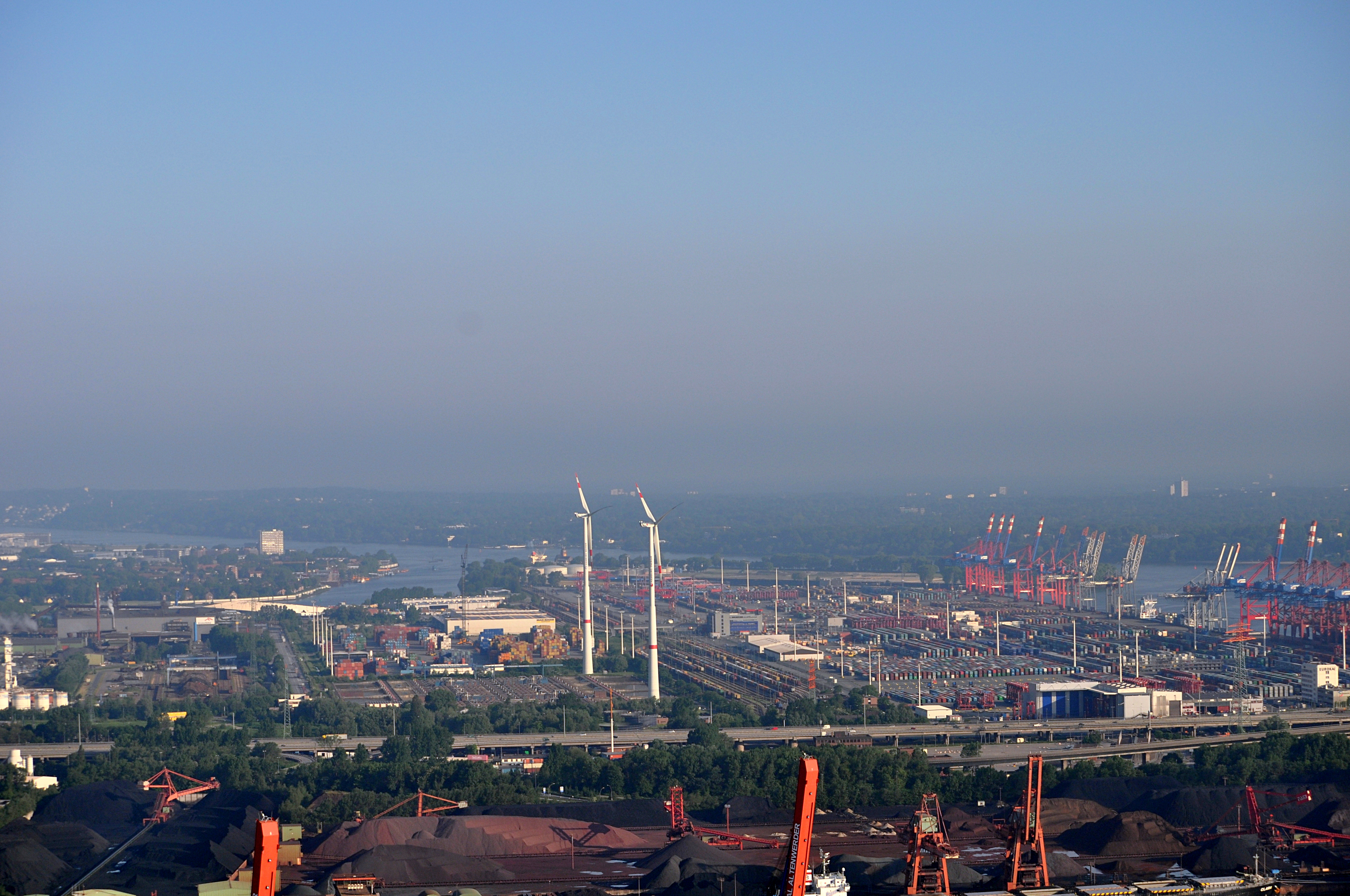 Hamburg-Waltershof, rechts der Containerterminal Eurogate im Vordergrund der Hansaport.